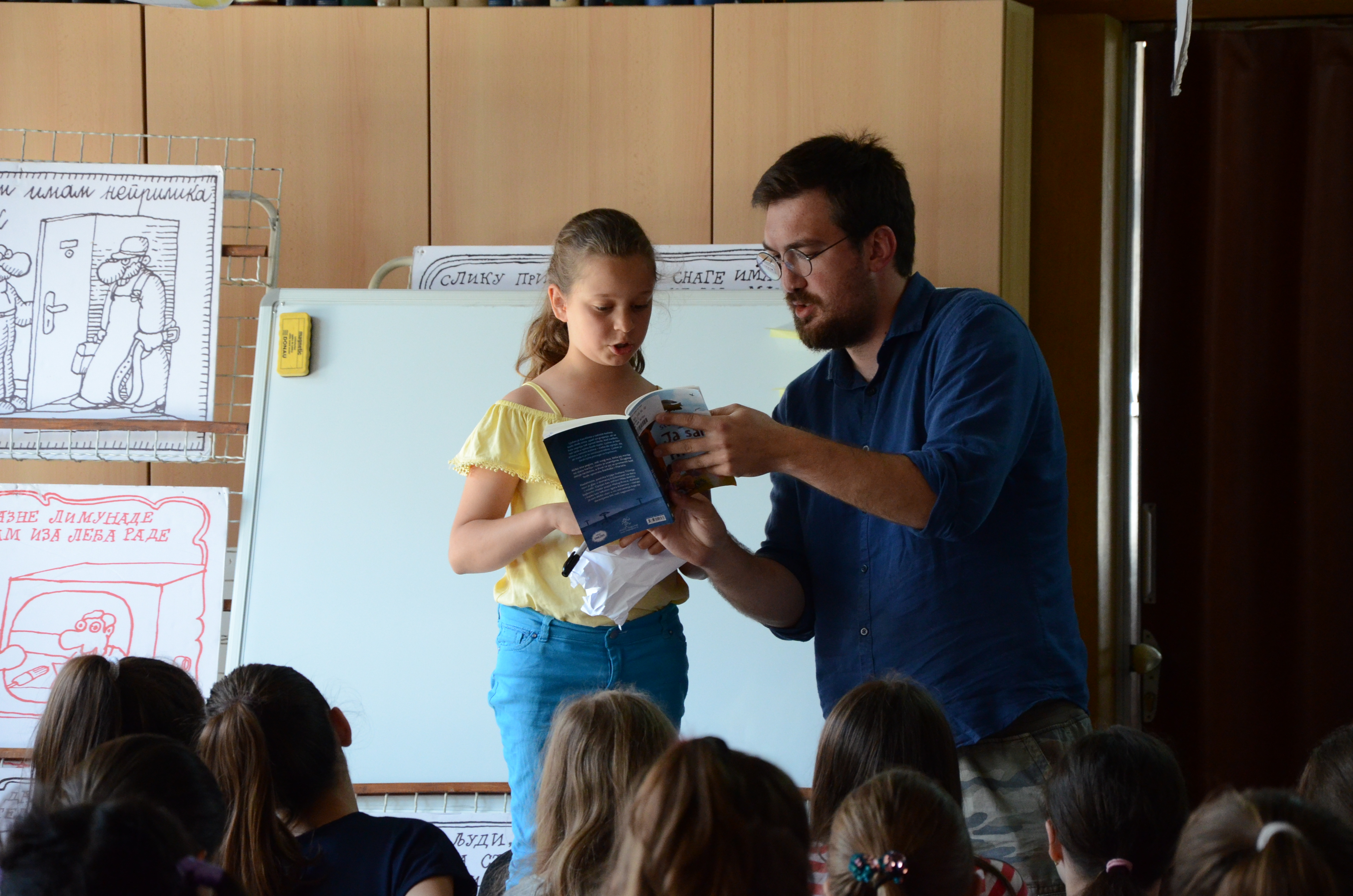 Stefan Mitić (Tićmi), pisac na gostovanju u Narodnoj biblioteci Pirot povodom manifestacije Čitalačka značka